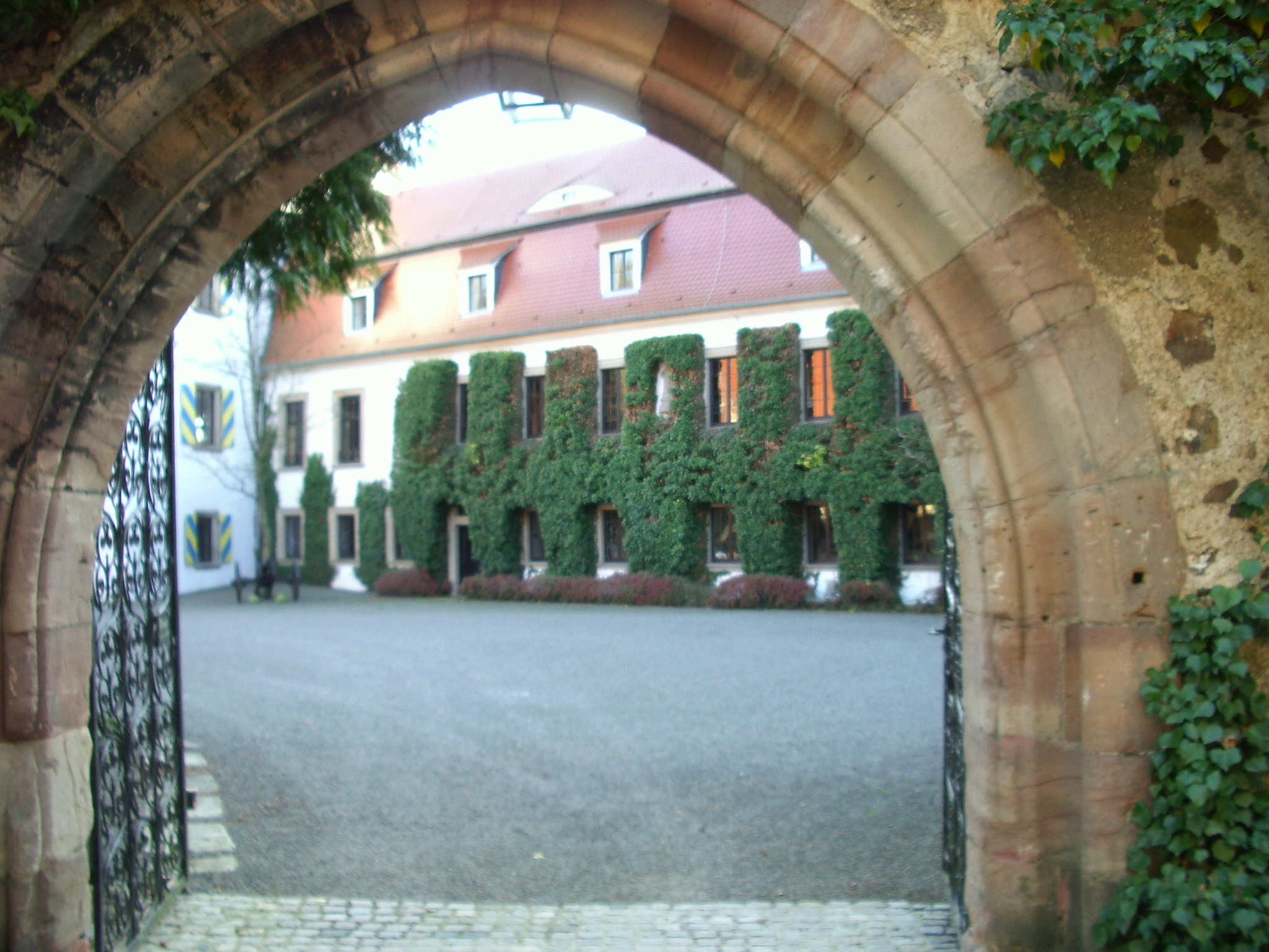 Blick auf das Hauptgebäude des Schloßes in Guttenberg